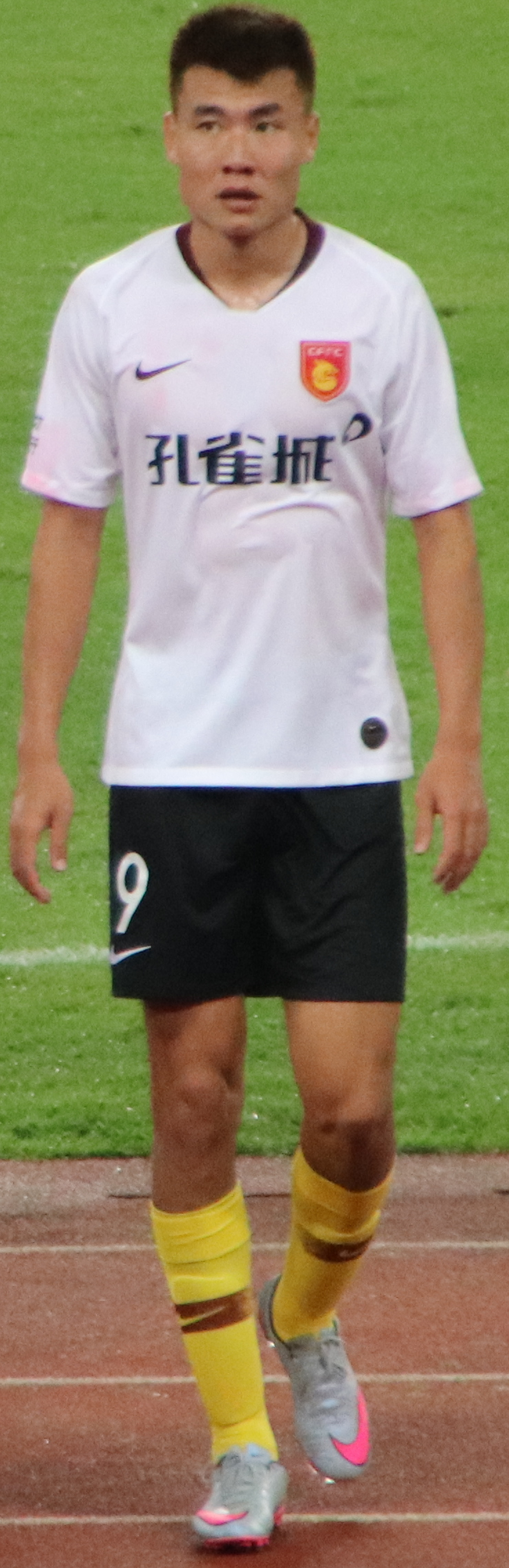 中文（中国大陆）: 河北华夏幸福球员：董学升